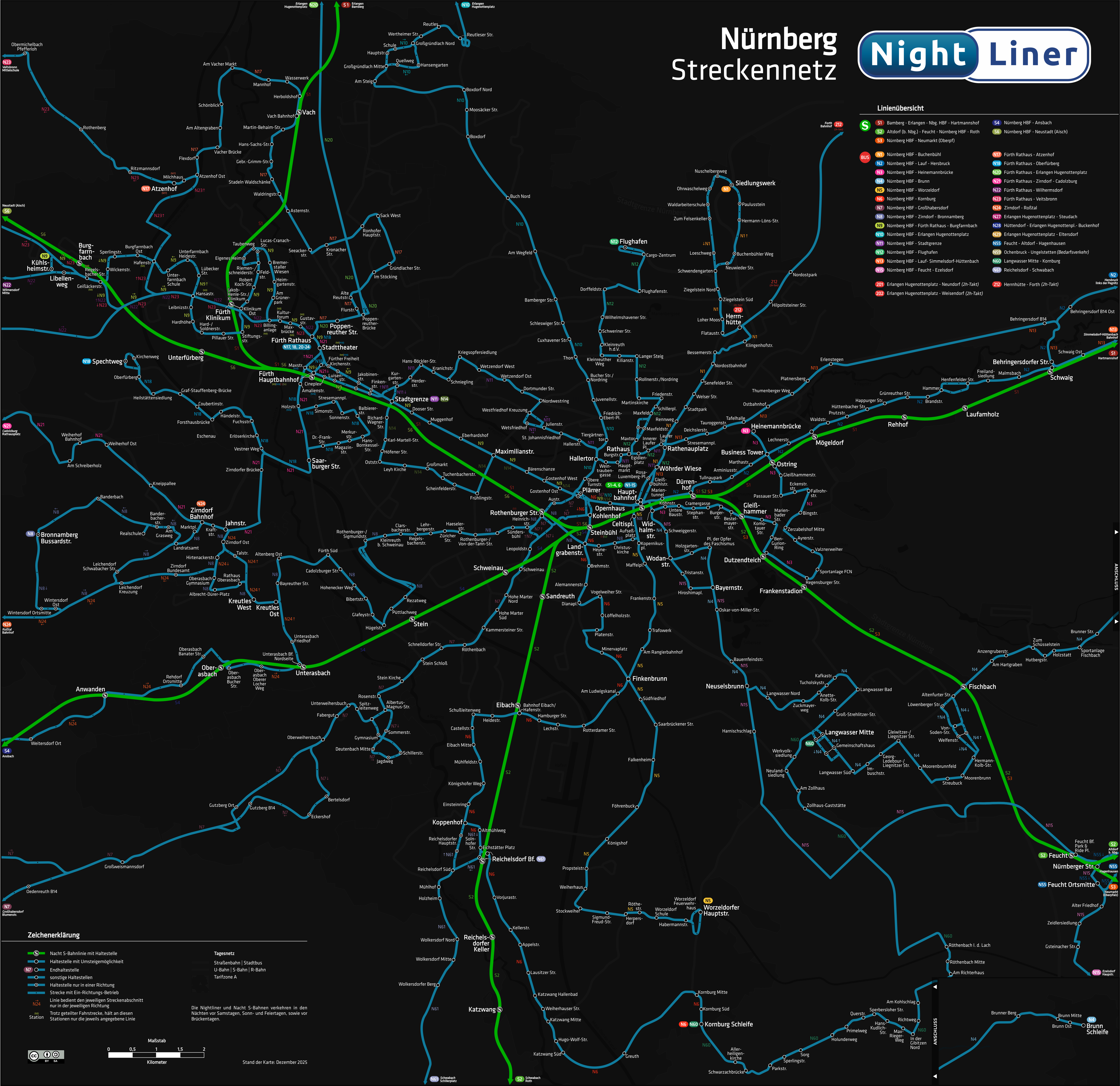 Linienübersicht des Nightliner Nürnberg